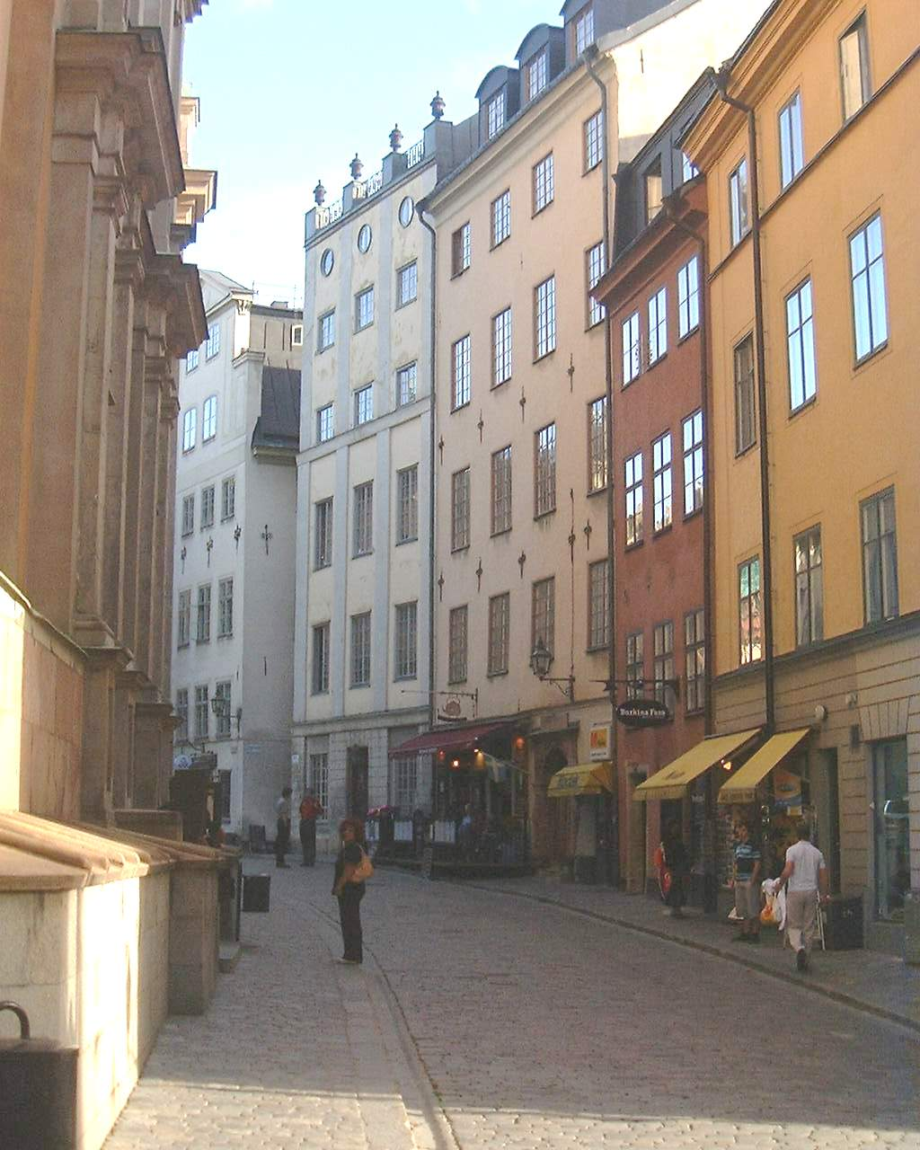 Jag tog denna bild med min egen kamera.